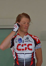 Christian Müller 2005